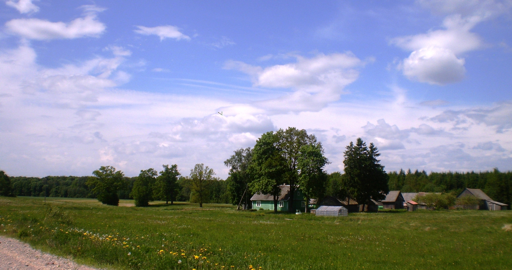 Gožiai, Kėdainių raj.